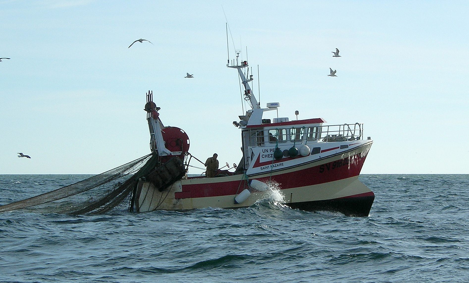 Image du user:CaptainHaddock recadrée.